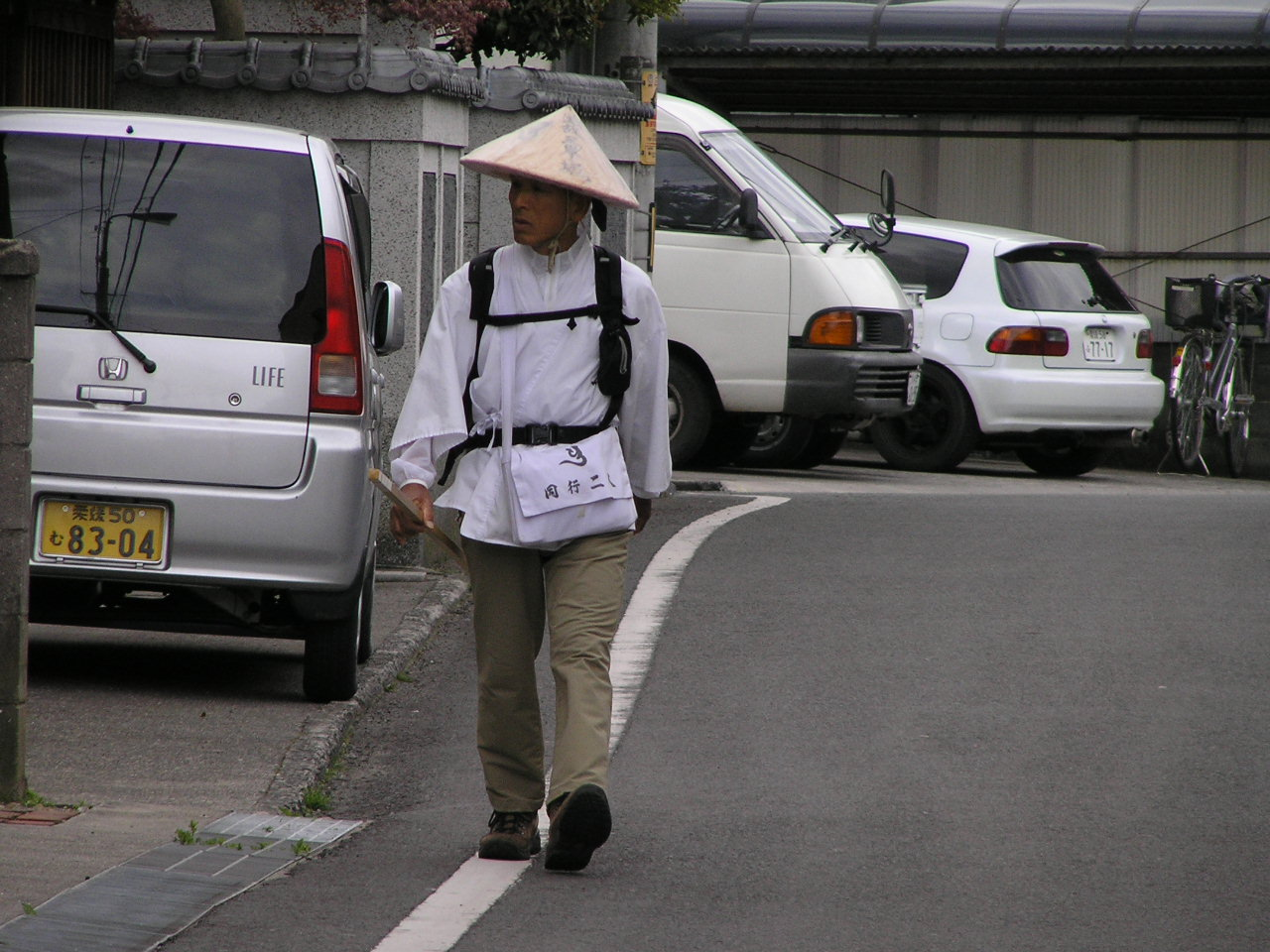 土居商店街をゆくお遍路さん